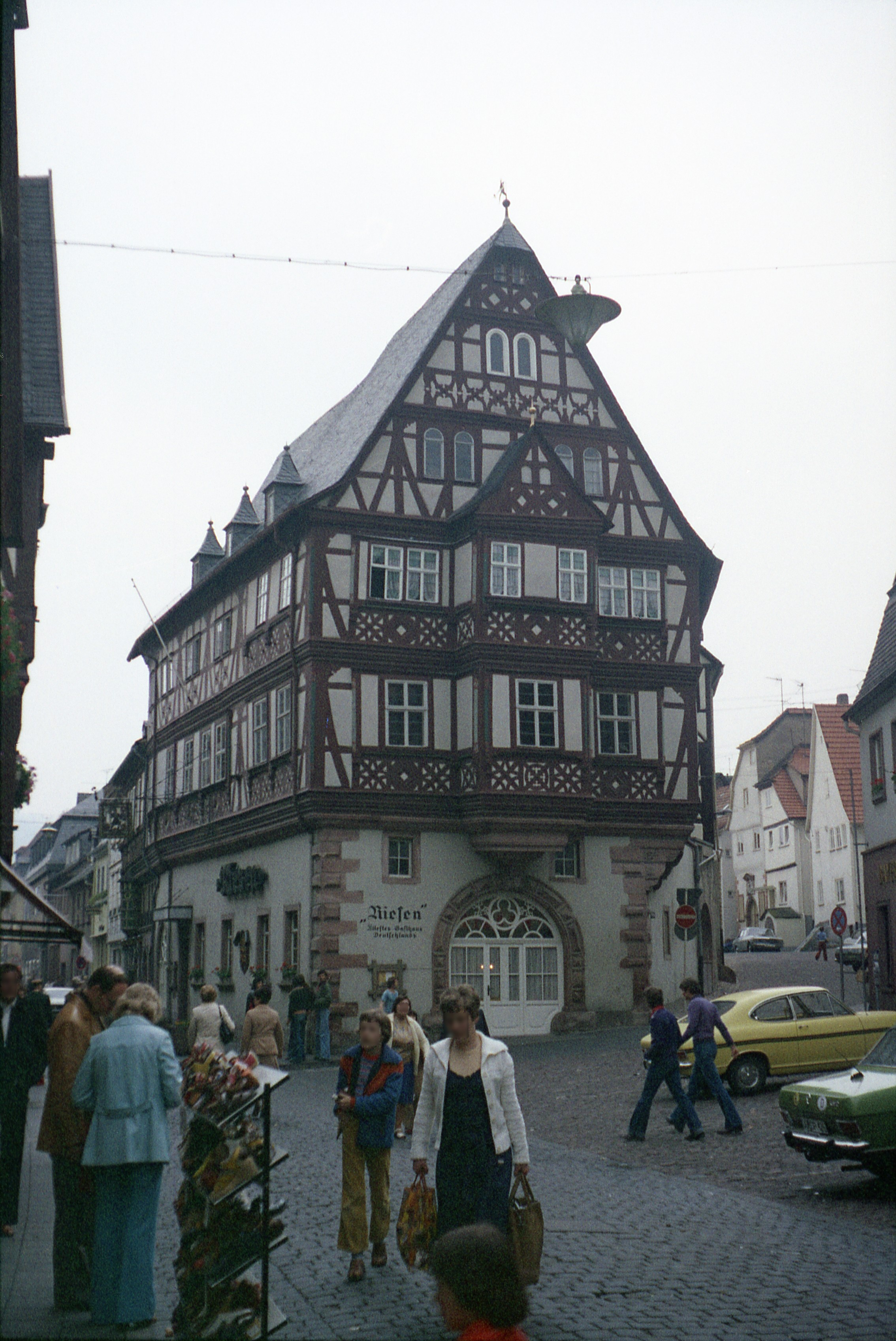 Gasthaus "Riesen" in Miltenberg